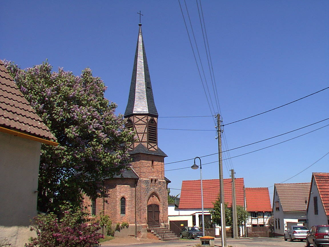 Blumerode Dorfkirche